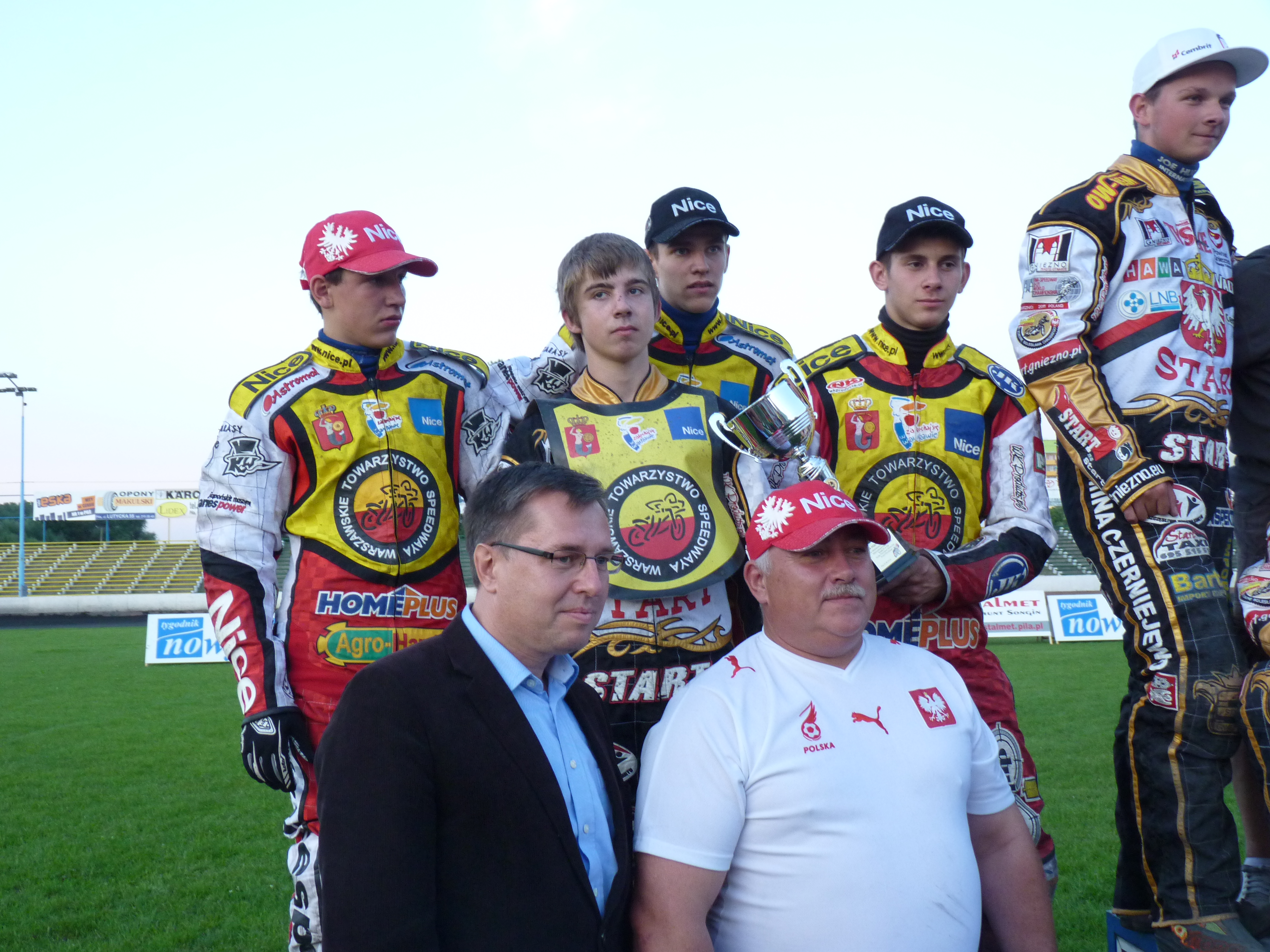 WTS Warszawa na podium MDMP w Pile 2011